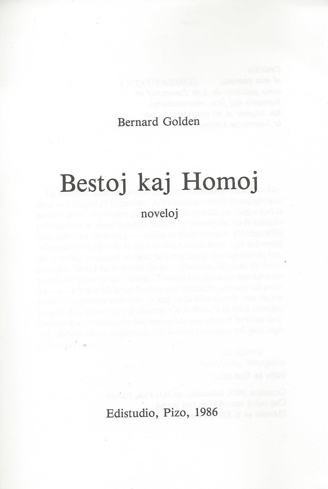 librokovrilo de "Bestoj kaj Homoj", 1986